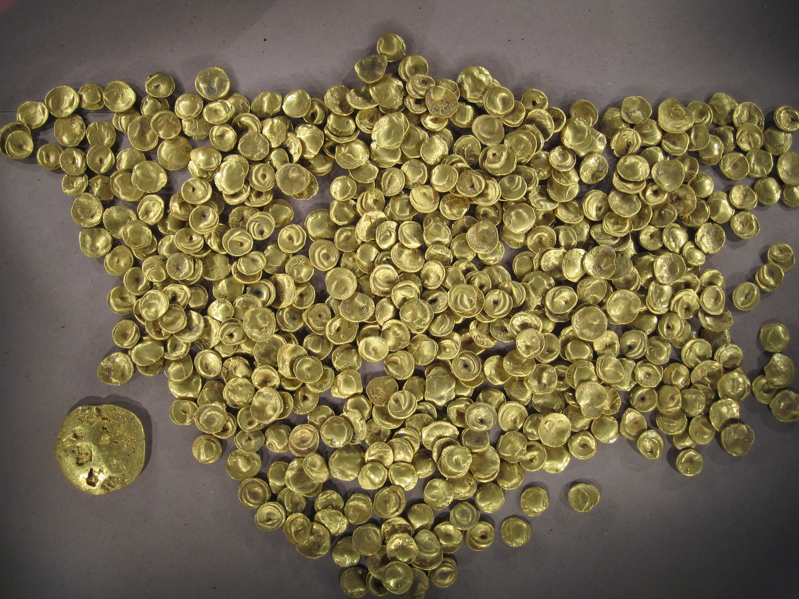 Celtic find in Manching, Germany (NOT rainbow-staters/keine Regenbogenschüsselchen [1])